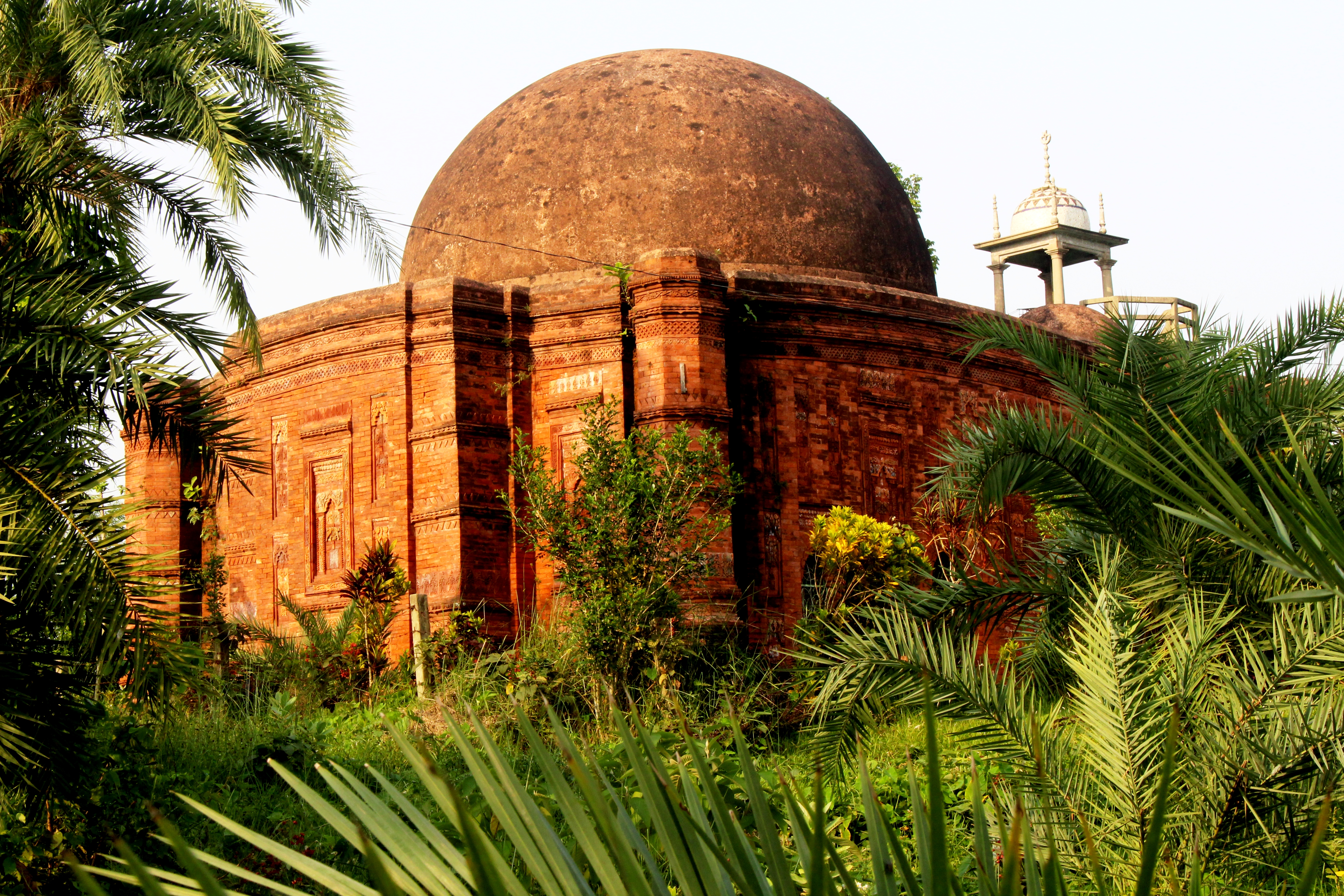 উচাইল মসজিদ